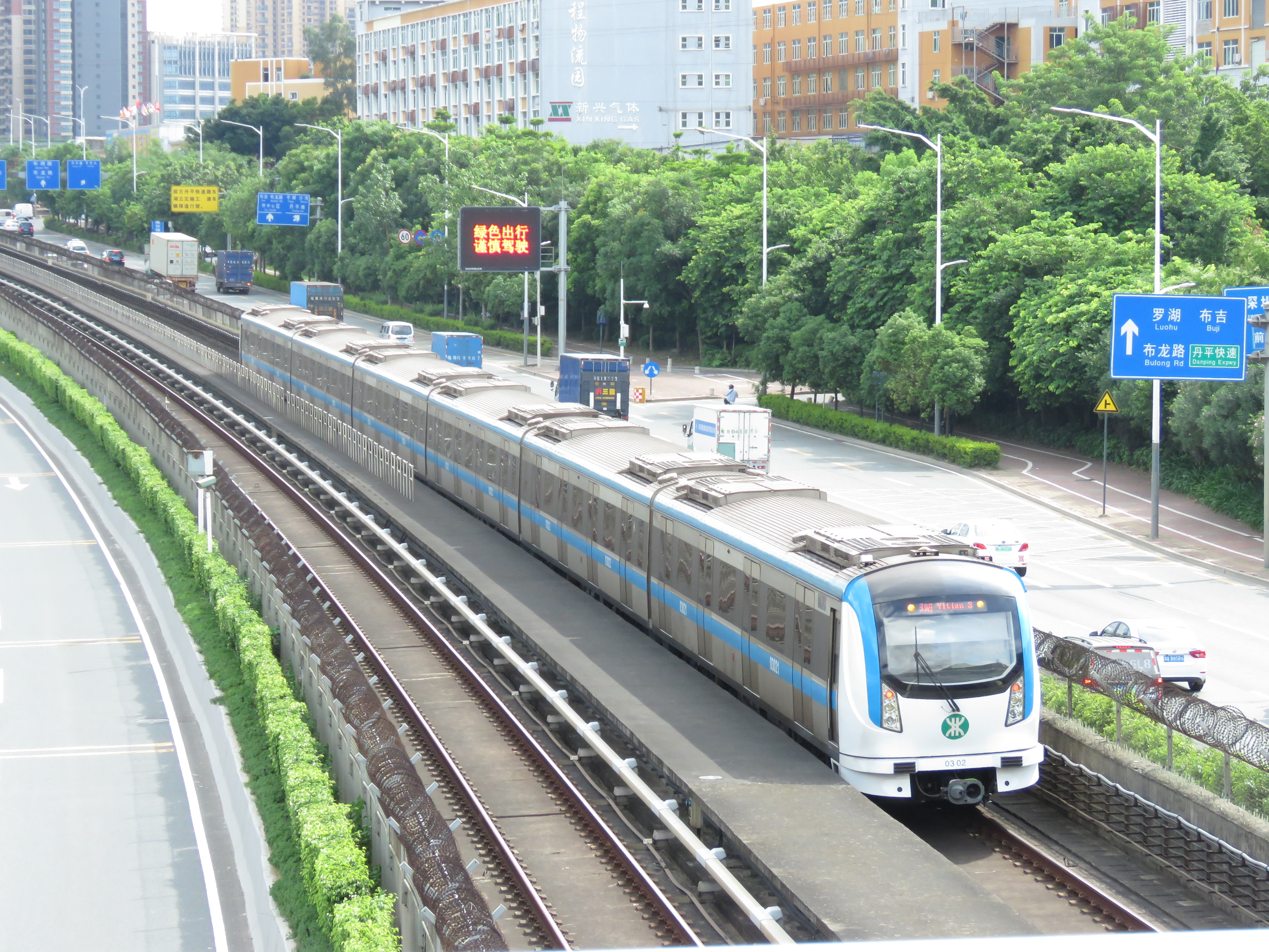 深圳地铁3号线长客B型列车